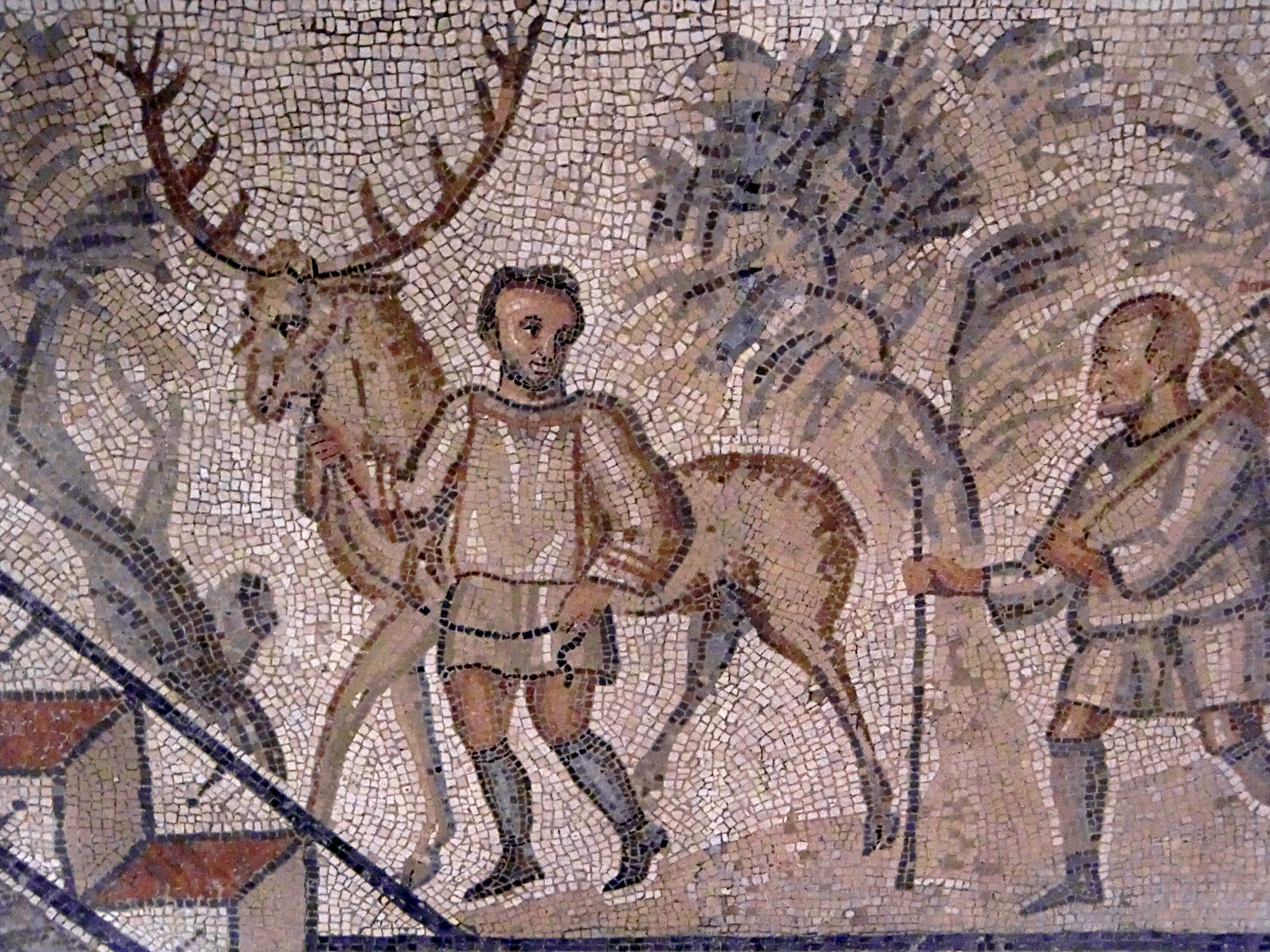 Mosaïque de Lillebonne - détail